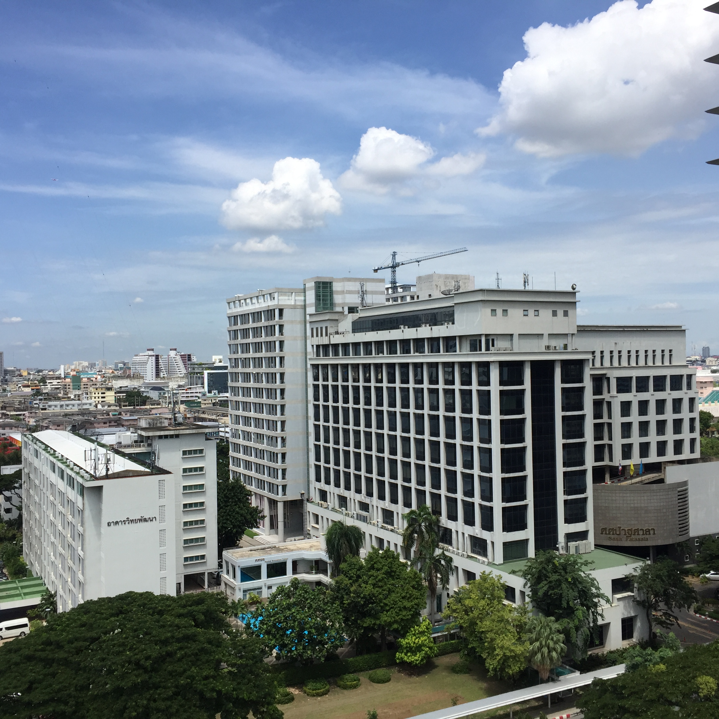 สถาบันบัณฑิตบริหารธุรกิจศศินทร์แห่งจุฬาลงกรณ์มหาวิทยาลัย